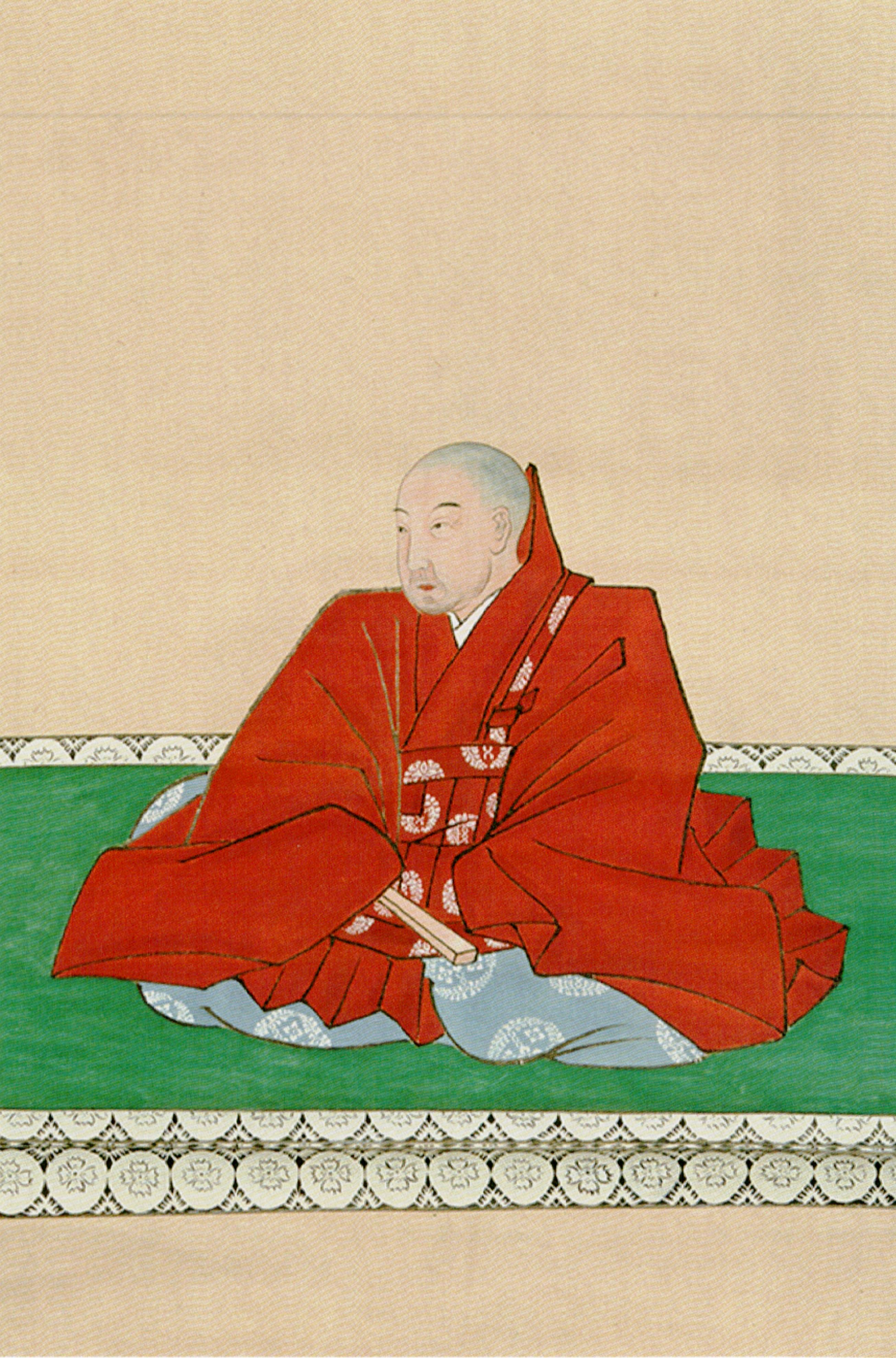 二条師良肖像画